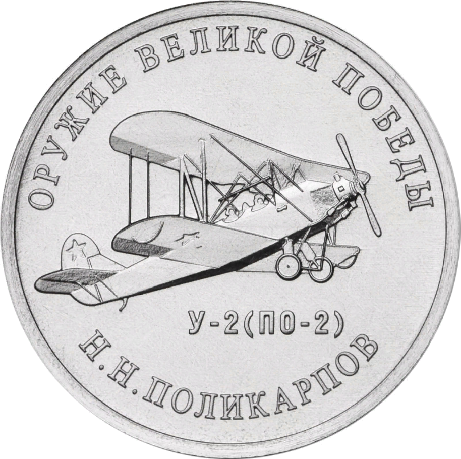 Монета Банка России. 25 рублей, реверс, анциркулейтед. Медно-никелевый сплав. Серия «Оружие Великой Победы (конструкторы оружия)». Конструктор Н.Н. Поликарпов, самолёт У-2 (По-2). Рельефное изображение многоцелевого биплана У-2 (По-2), под ним – надпись «У-2 (ПО-2)»; вдоль канта – надписи, вверху: «ОРУЖИЕ ВЕЛИКОЙ ПОБЕДЫ», внизу: «Н.Н. ПОЛИКАРПОВ». Художник: О.Г. Шепель. Скульптор: компьютерное моделирование. Московский монетный двор.